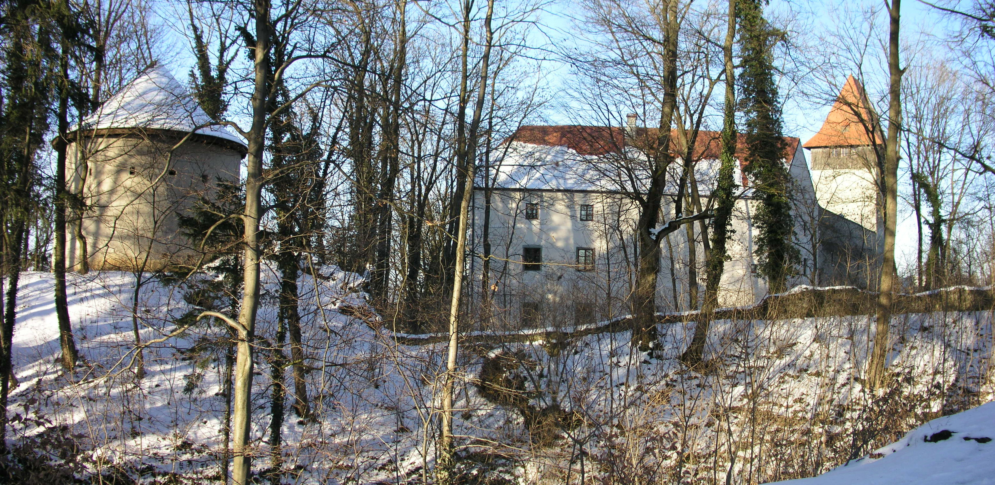 Schloss Ulmerfeld samt Vorwerken, Panoramabild von der Hauptstraße gesehen